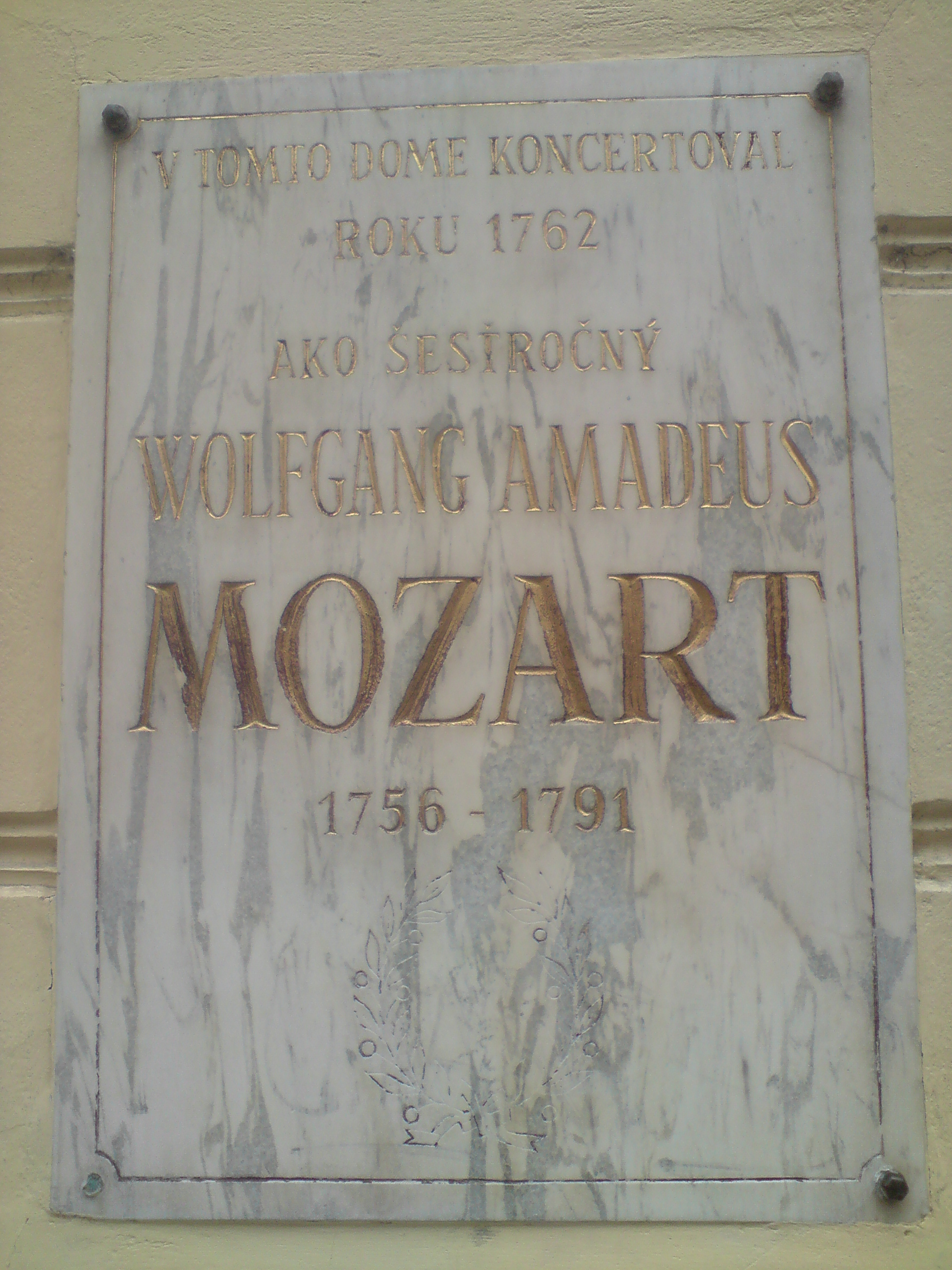 Pálffyho palác, Panská, Bratislava